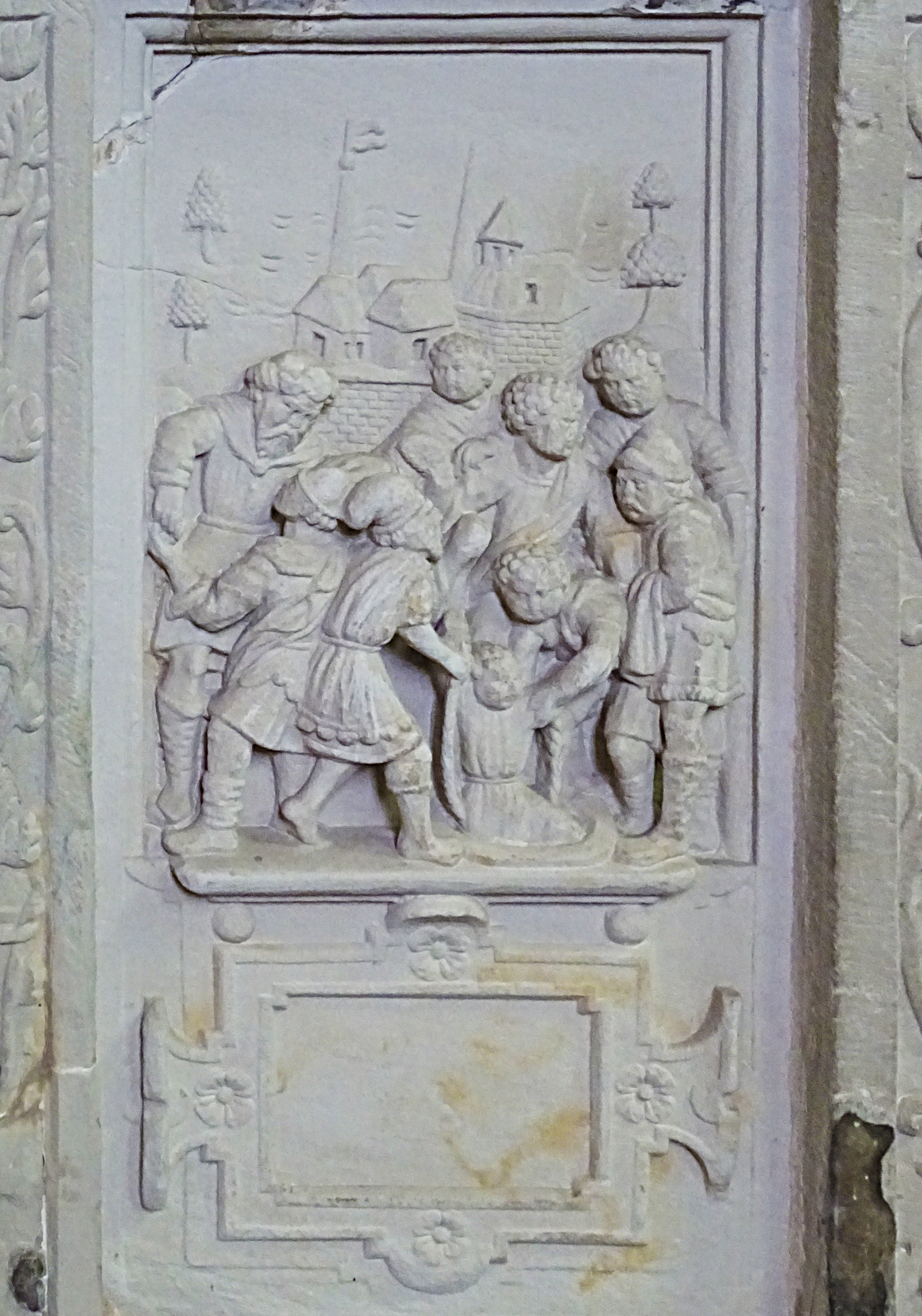 Steinbilderbibel in der St. Annenkirche (Eisleben), 12/29, Josef wird nach Ägypten verkauft